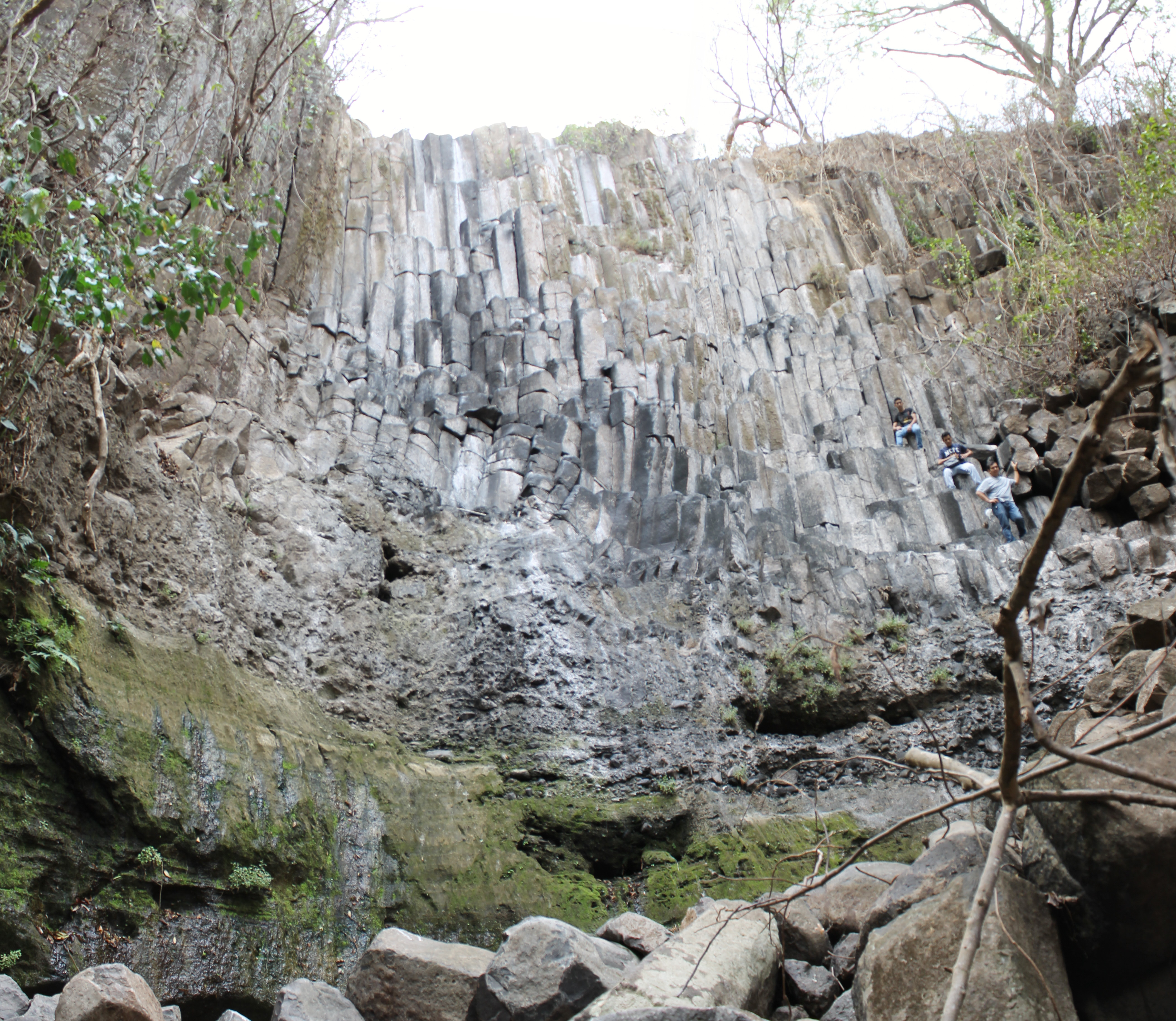 Cascada los tercios Suchitoto, compuesta de dos fotos verticales.